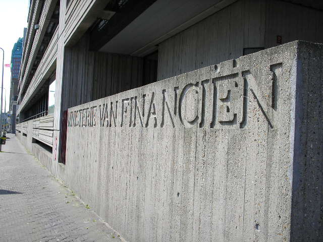 Ministerie van Financiën (Nederland) - vervanging van de vorige foto... op precies dezelfde plaats genomen, door verschillende mensen, grappig...